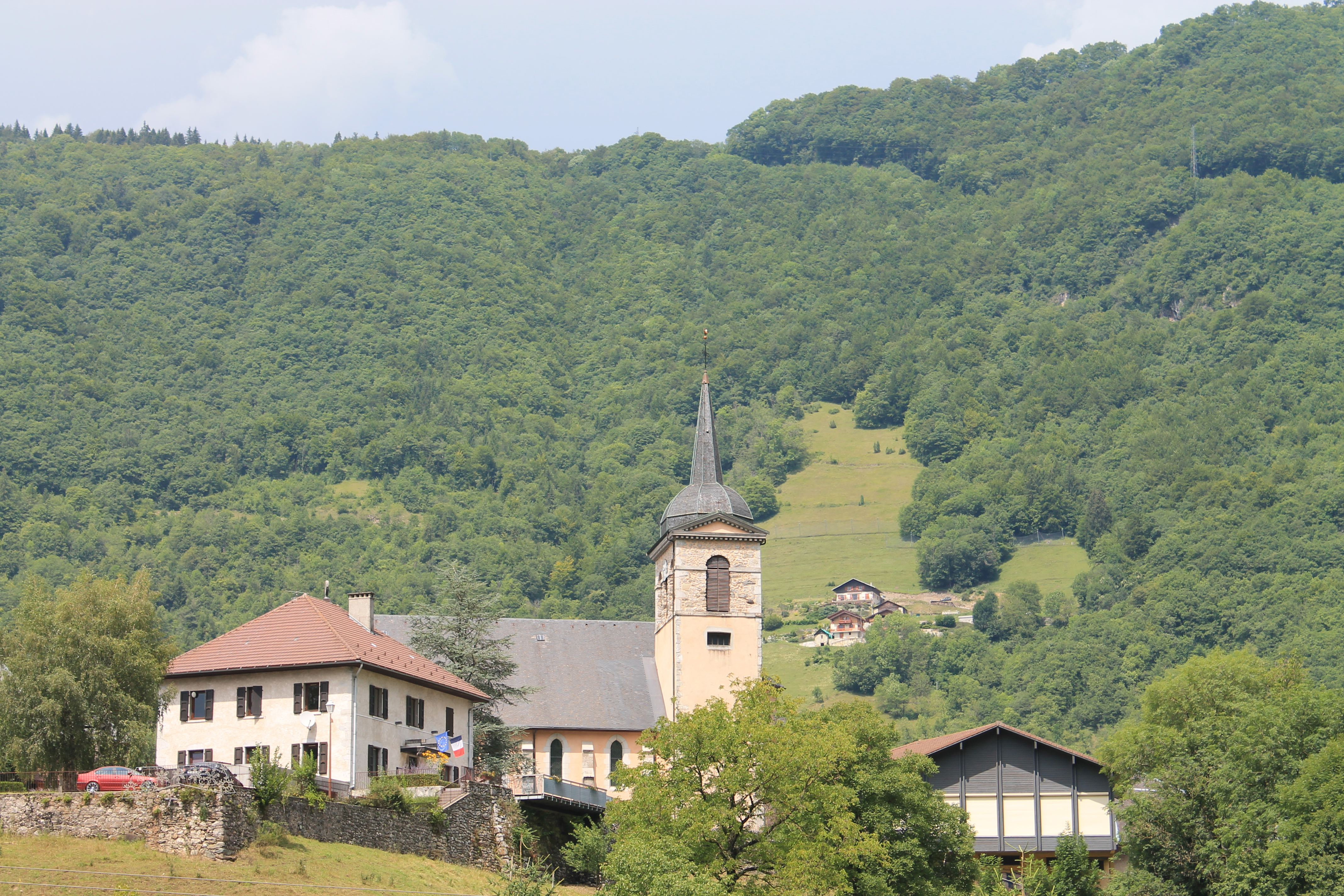 Eglise de Marlens depuis la RD 1508.